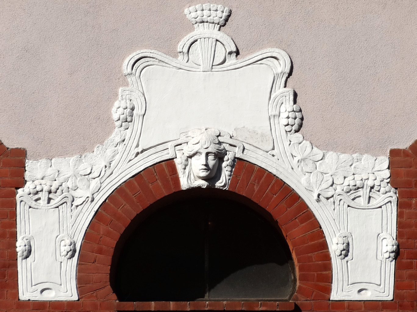 Kamienica przy ul. Cieszkowskiego 12 w Bydgoszczy (1902-1903 Victor Petrikowski)